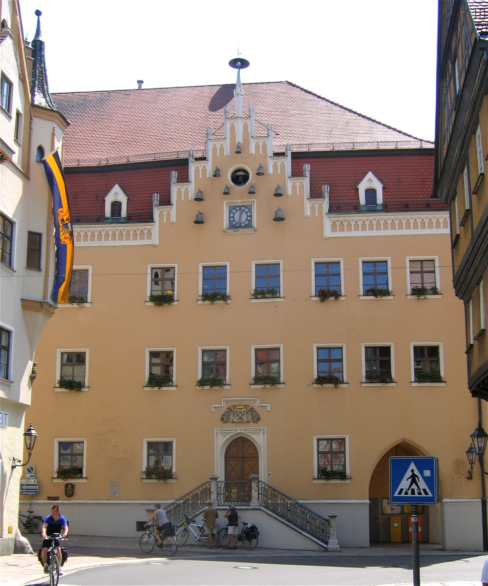 Rathaus, Donauwörth